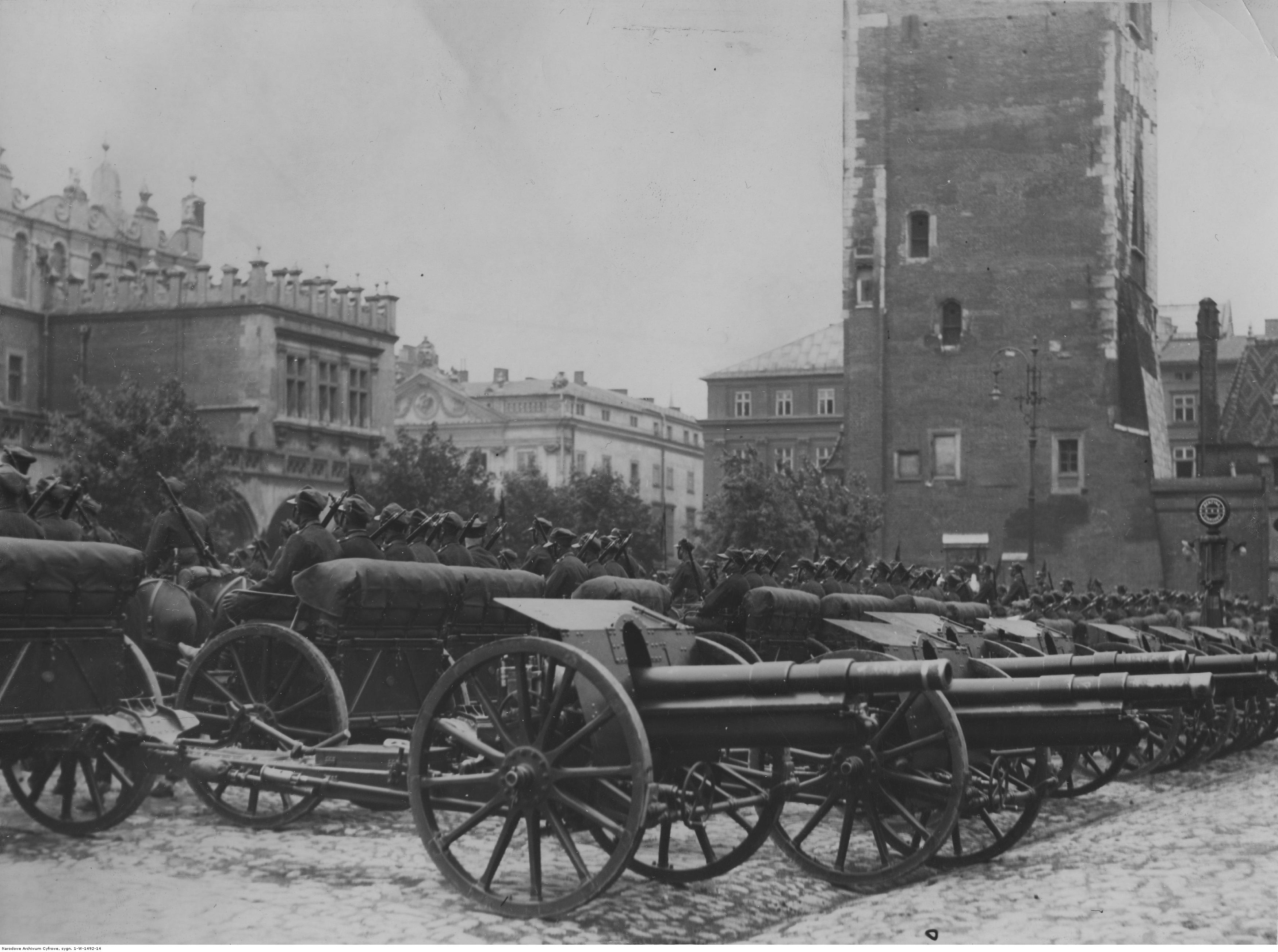 Piętnastolecie 6 Pułku Artylerii Lekkiej w Krakowie. Baterie haubic 100 mm wz. 1914/19 z przodkiem w trakcji konnej z 6 Pułku Artylerii Lekkiej na Rynku Głównym. Koncern Ilustrowany Kurier Codzienny - Archiwum Ilustracji. Sygnatura: 1-W-1492-14